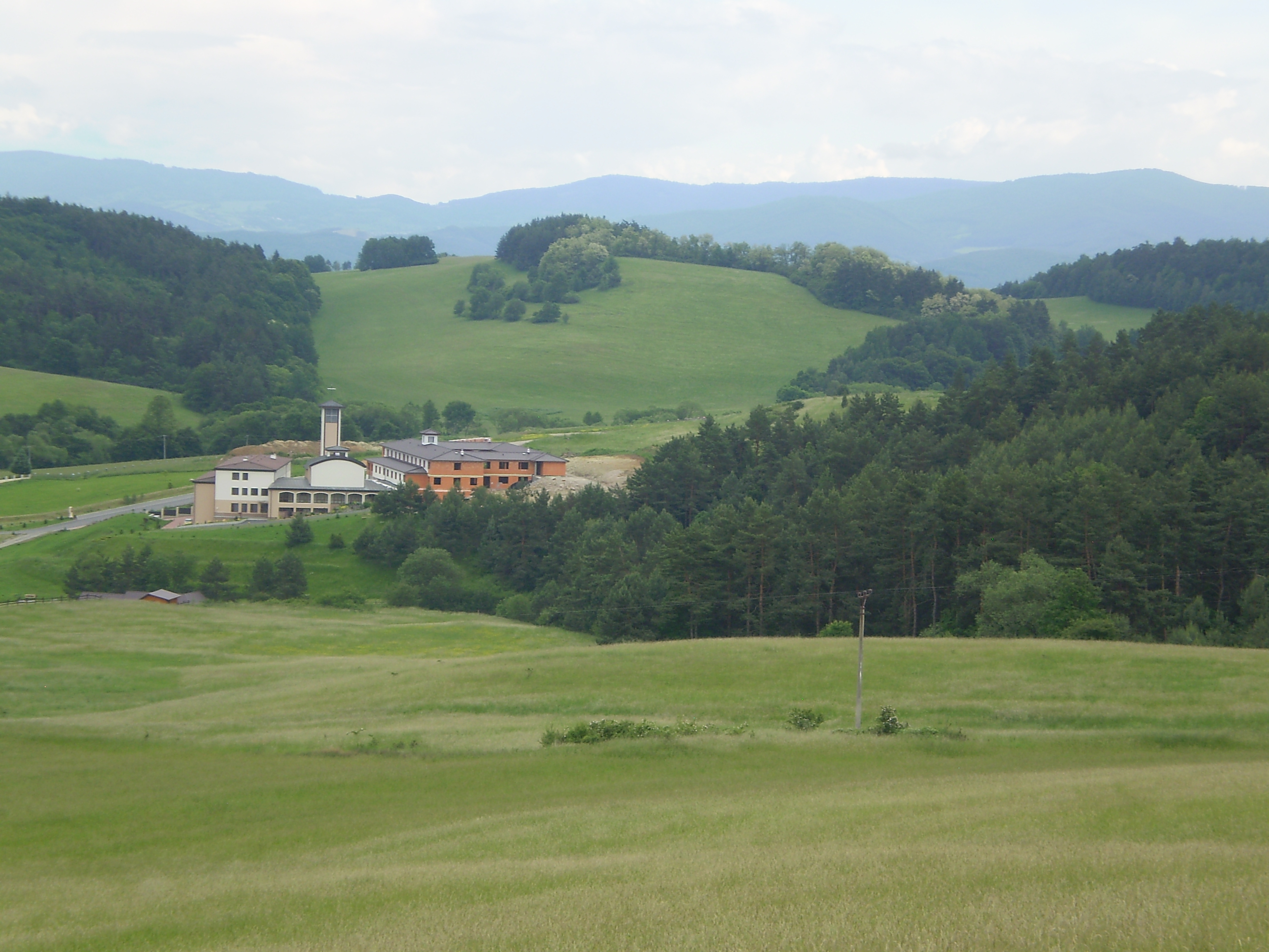 dedinka Sampor